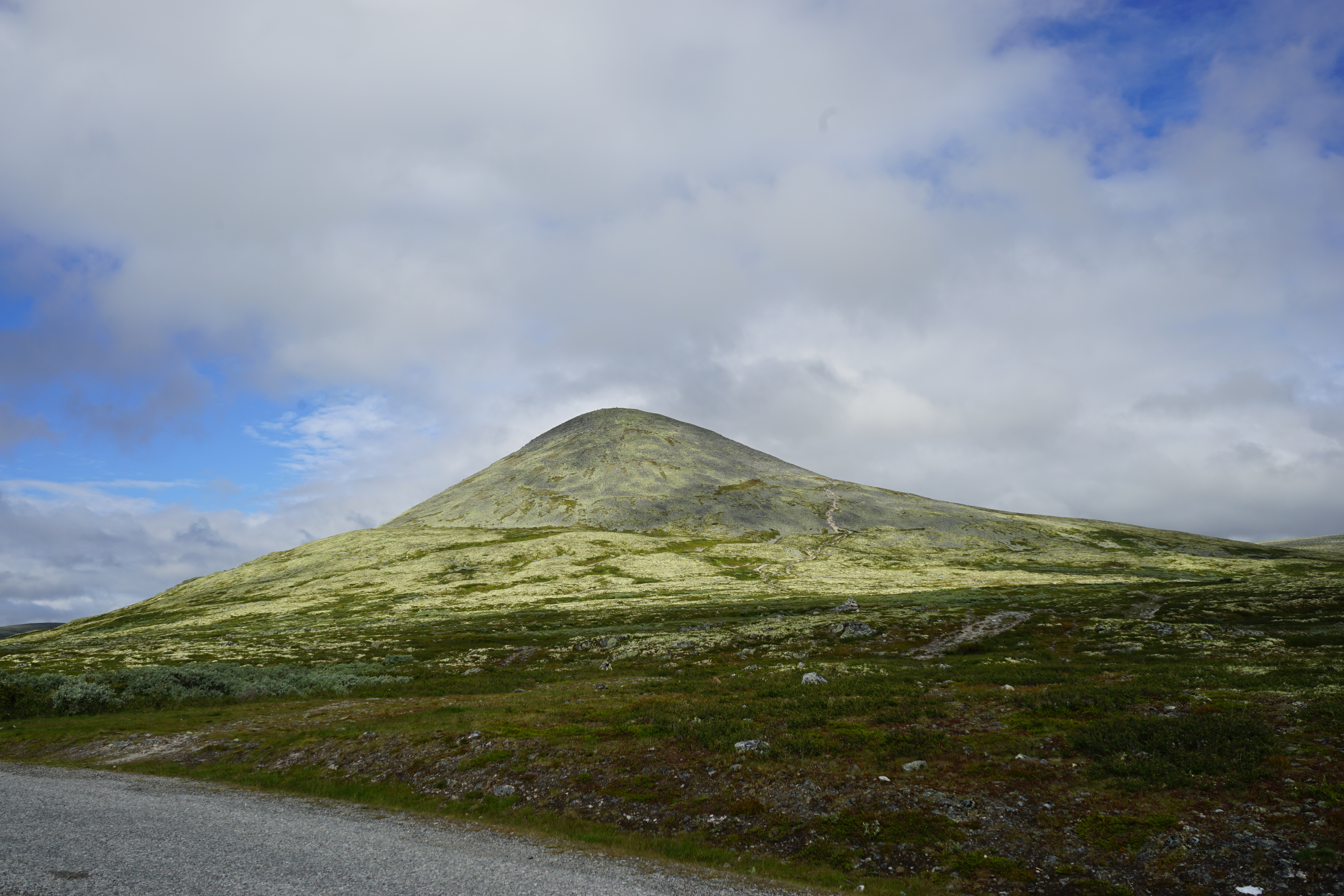 Fjellet Muen(1424 moh)